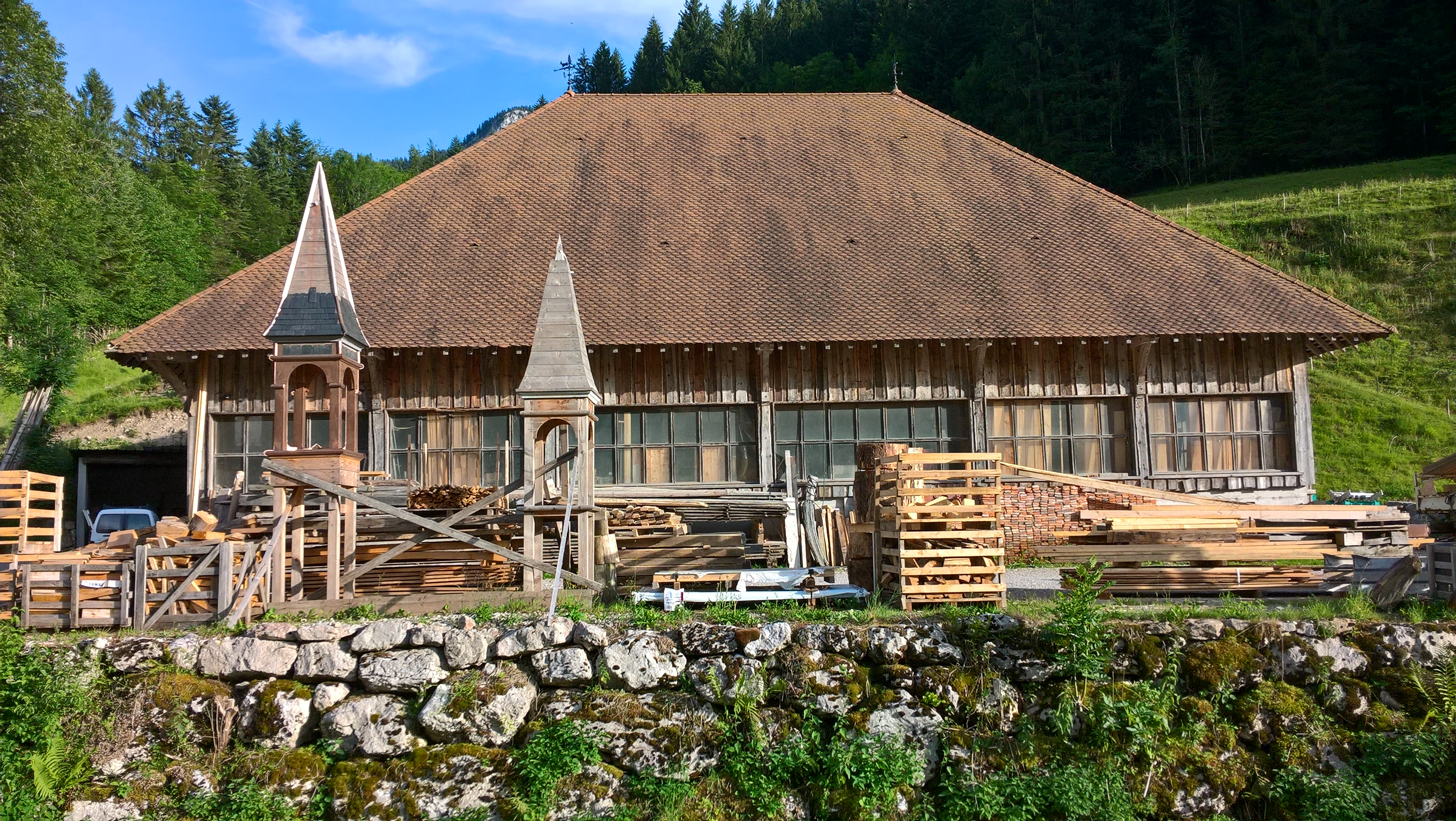 Saint-Pierre-d'Entremont (Isère), tournerie de Saint-Même près du hameau de Saint-Même-d'en-bas